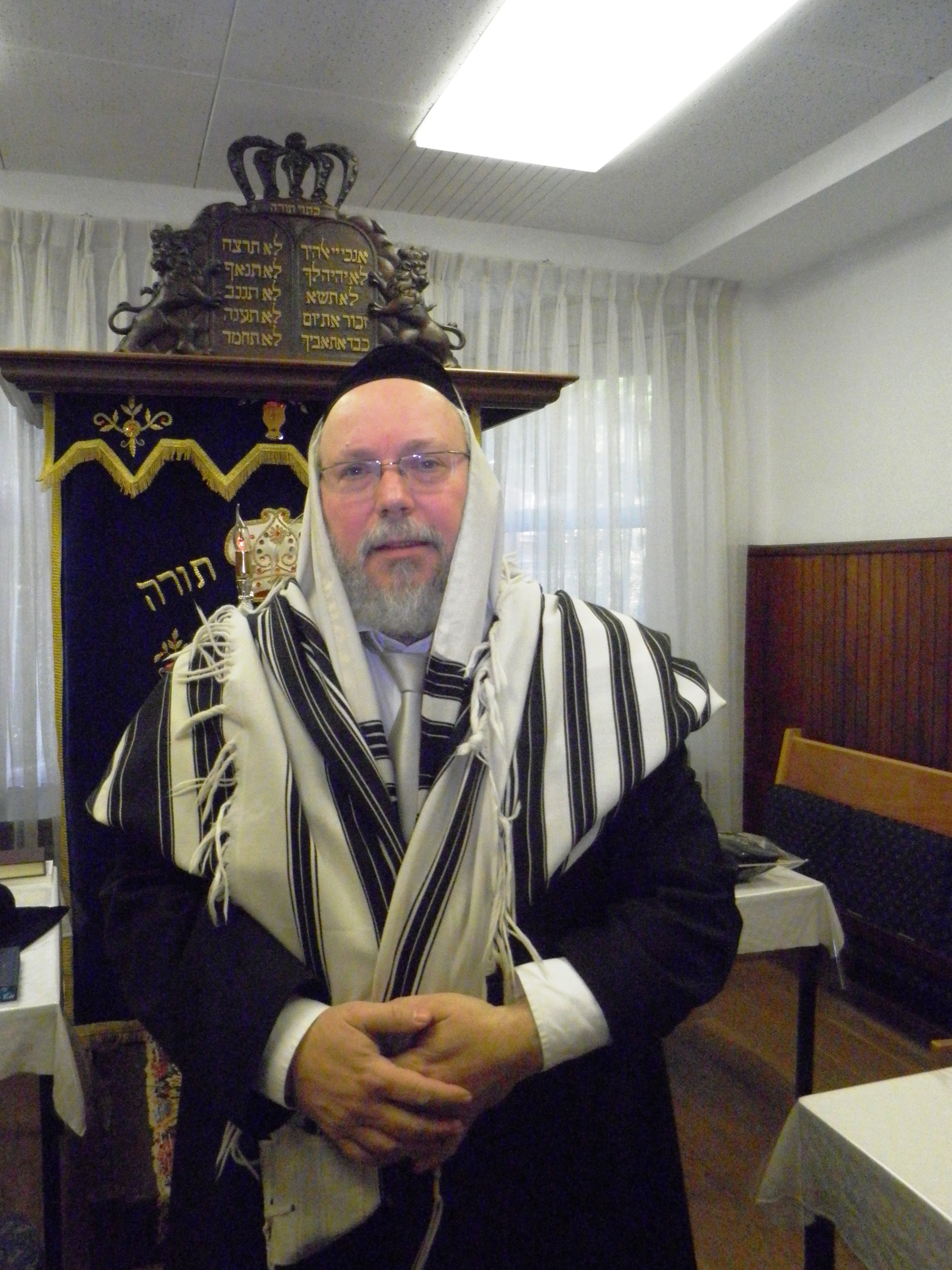 הרב אייפערס